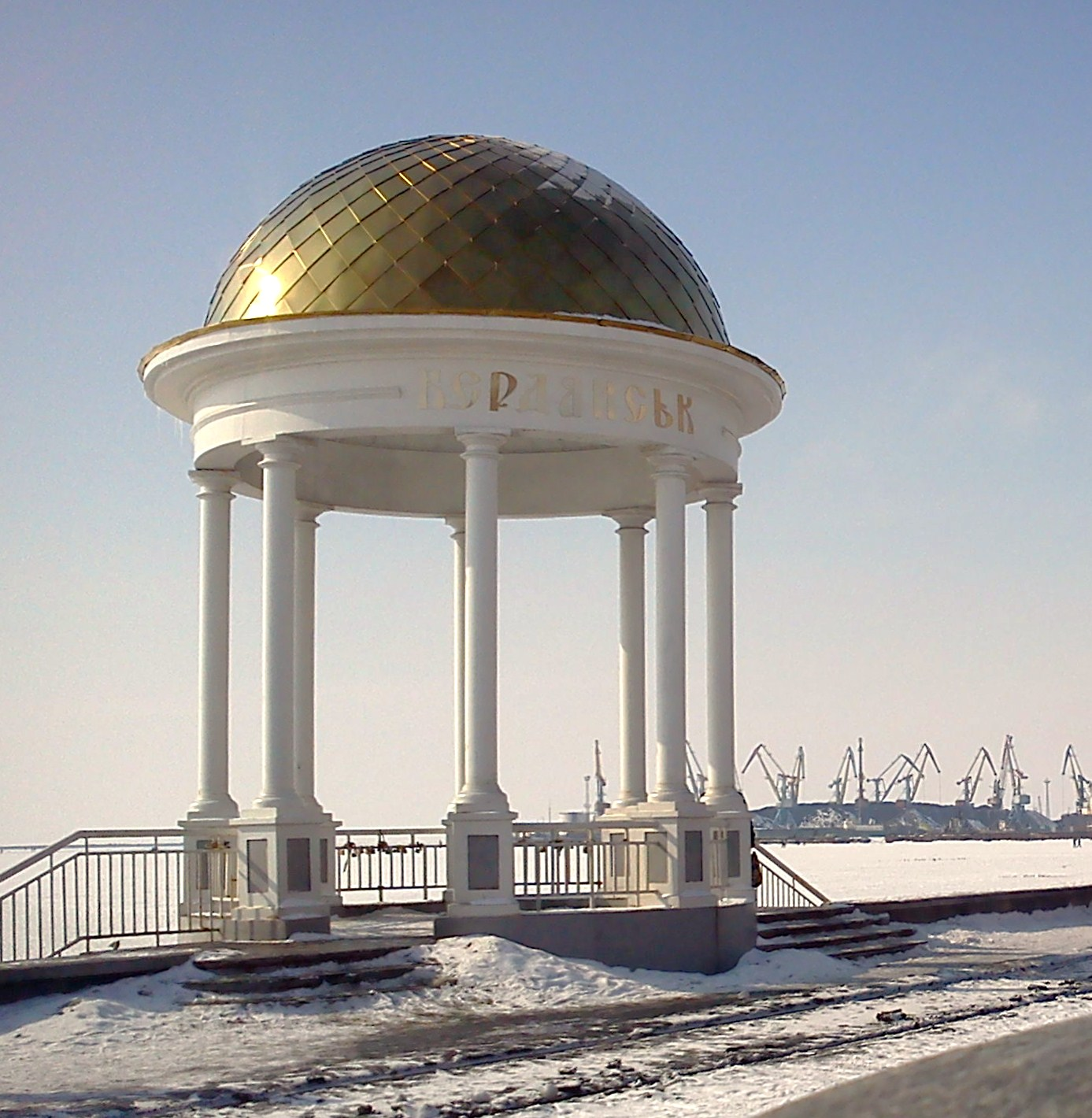 источник сообщество